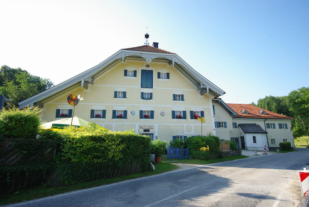 Obermühle Bad Reichenhall, Haupthaus Nebengebäude